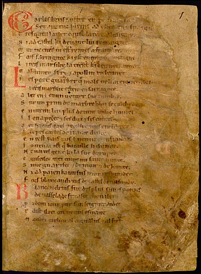 Première page de la Chanson de Roland, manuscript d'Oxford